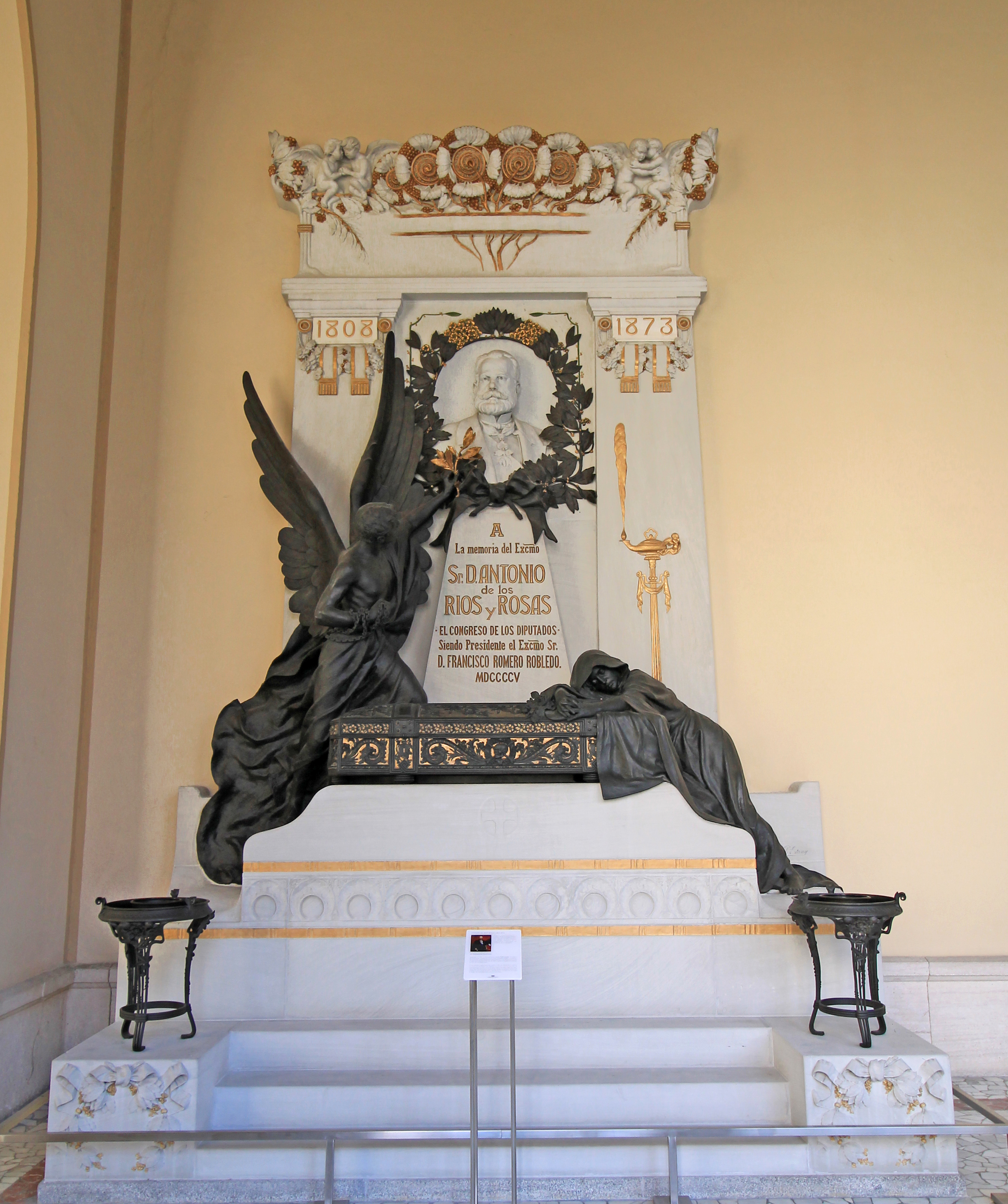 Mausoleum of Antonio de los Ríos Rosas.